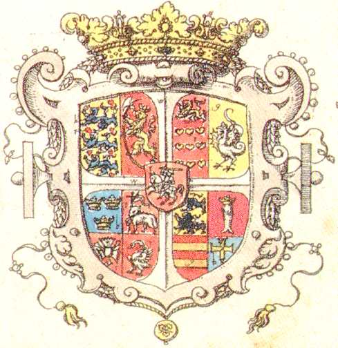 Wappen Dänemark, Siebmacher 1605, public domain